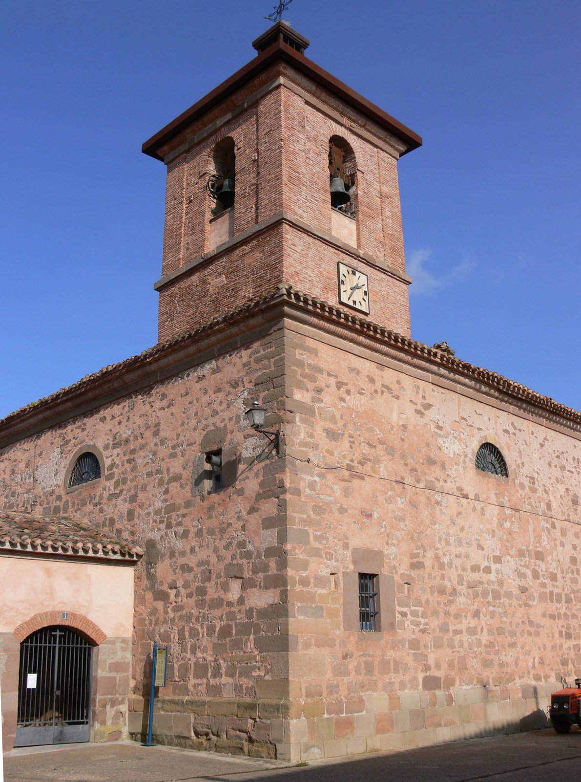 Iglesia de Santa María en Cordovin, La Rioja (España)